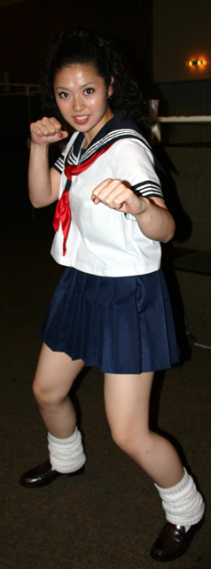 Asamai auf dem "Weekend of Horrors", Bottrop, Deutschland am 07.05.2011.